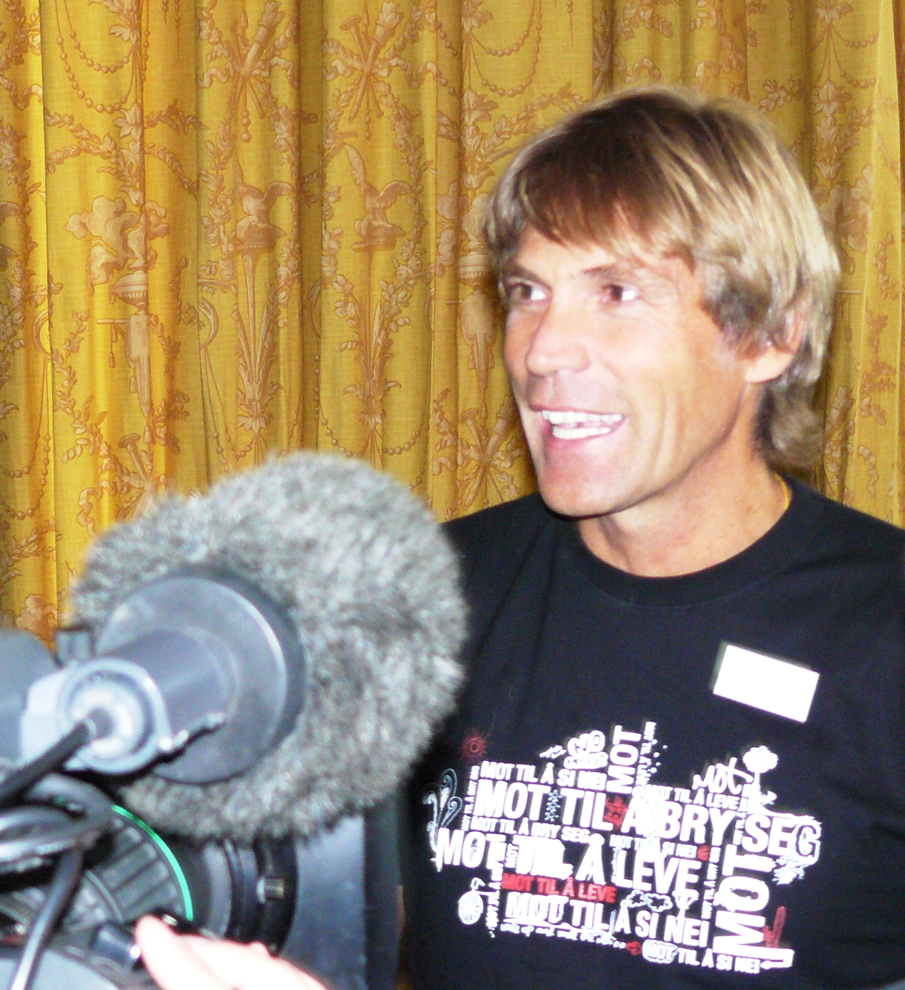 Atle Vårvik, fmr speedskater and director of MOT